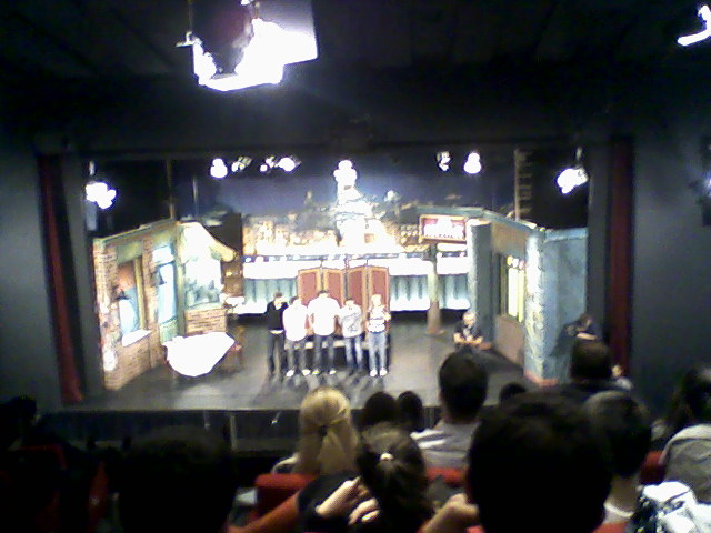 "Çok Güzel Hareketler Bunlar", bir oyun sonrası.